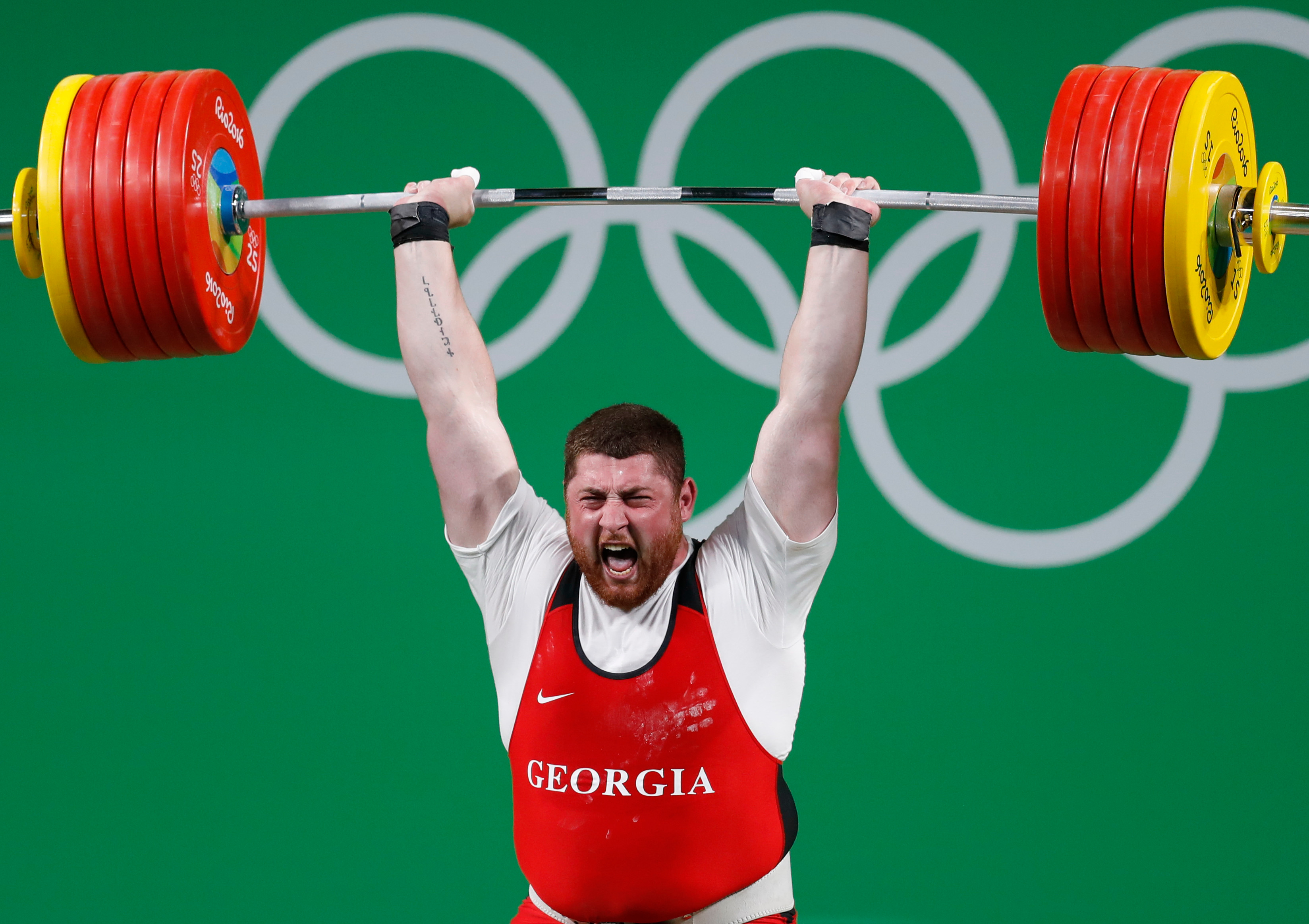 Rio de Janeiro - O georgiano Lasha Talakhadze bate o recorde mundial e leva ouro no levantamento de peso com 473kg ( Fernando Frazão/Agência Brasil)